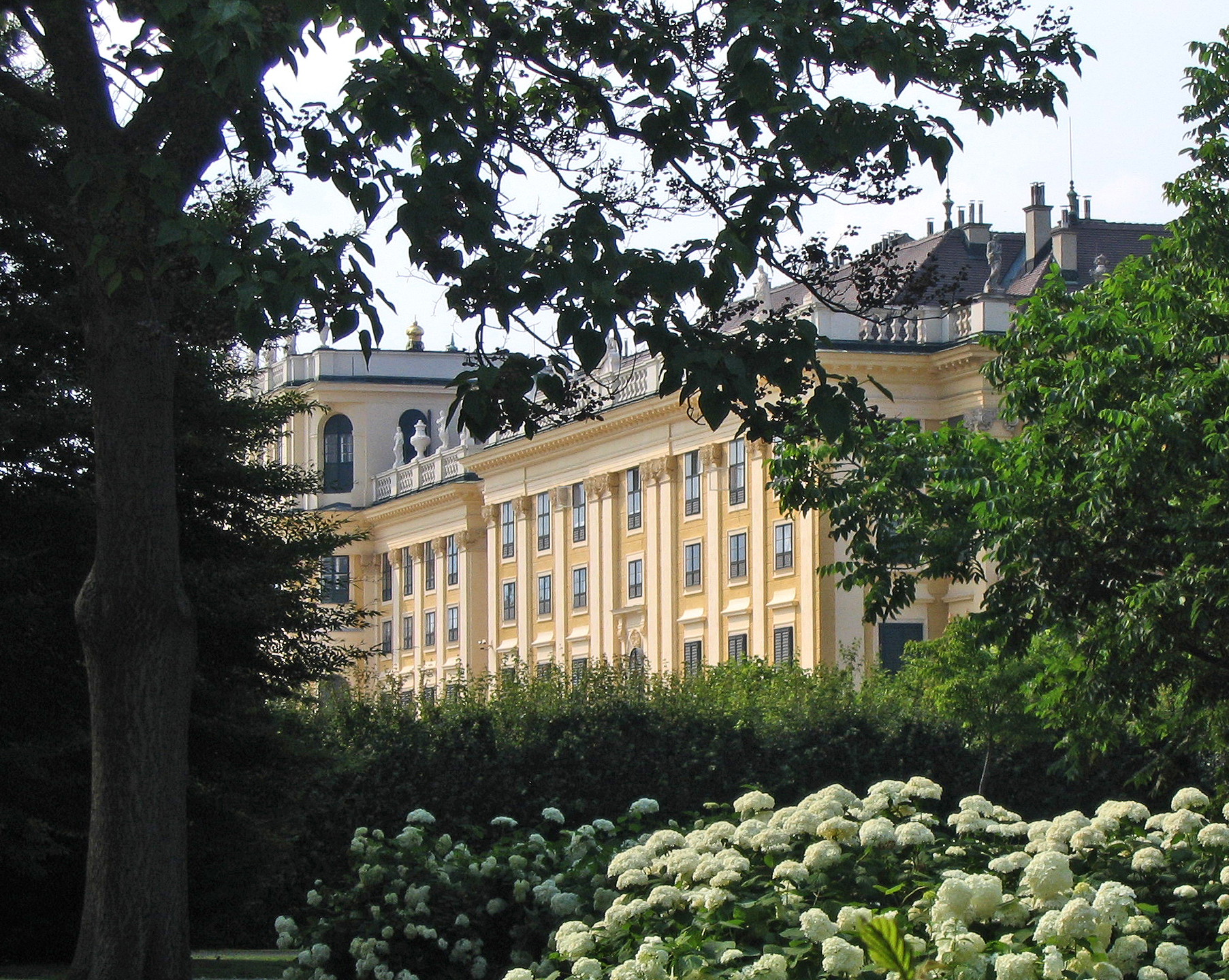 Schönbrunn Palace, Vienna